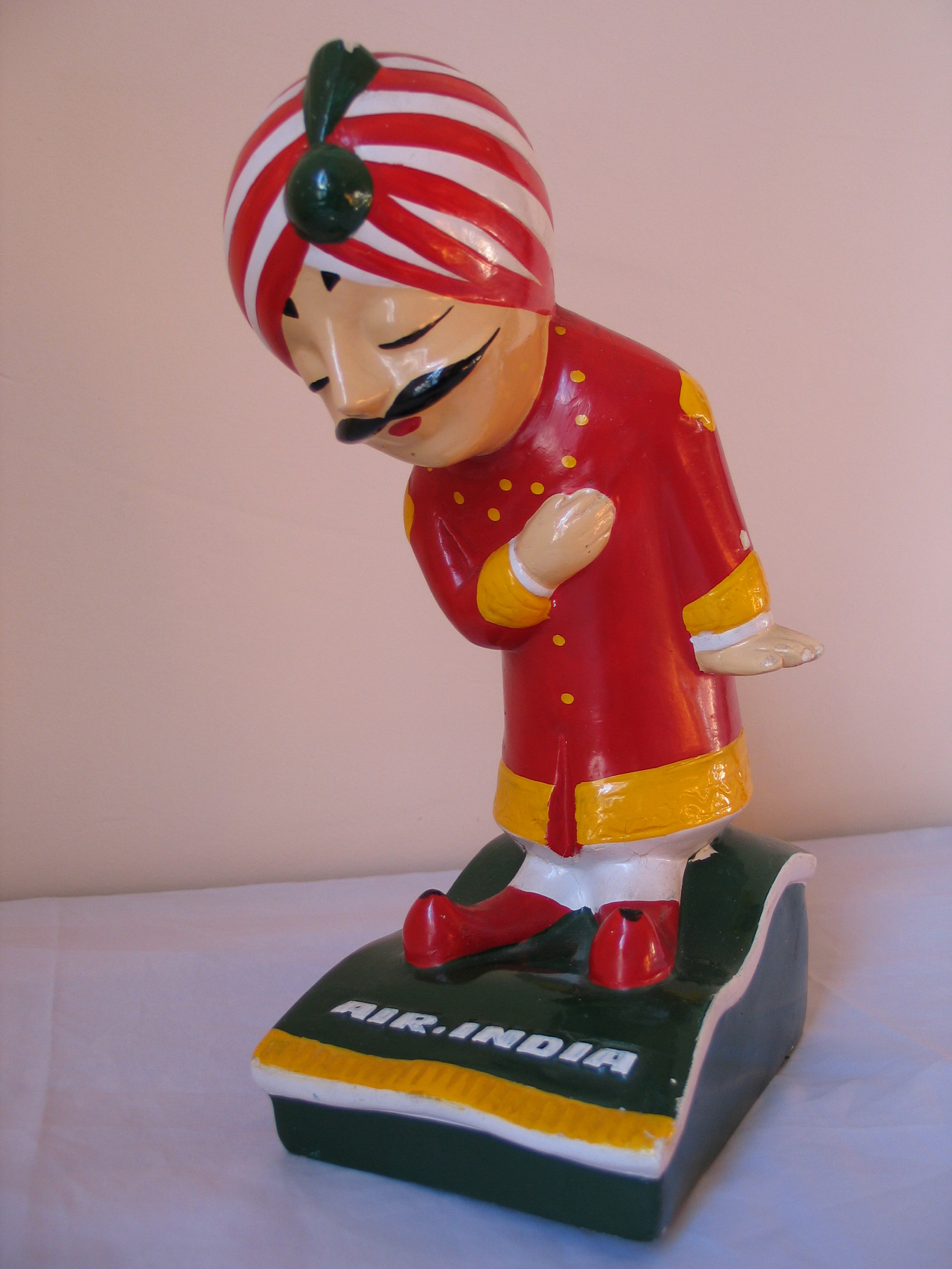 Mascotte Air India / Air India Mascot